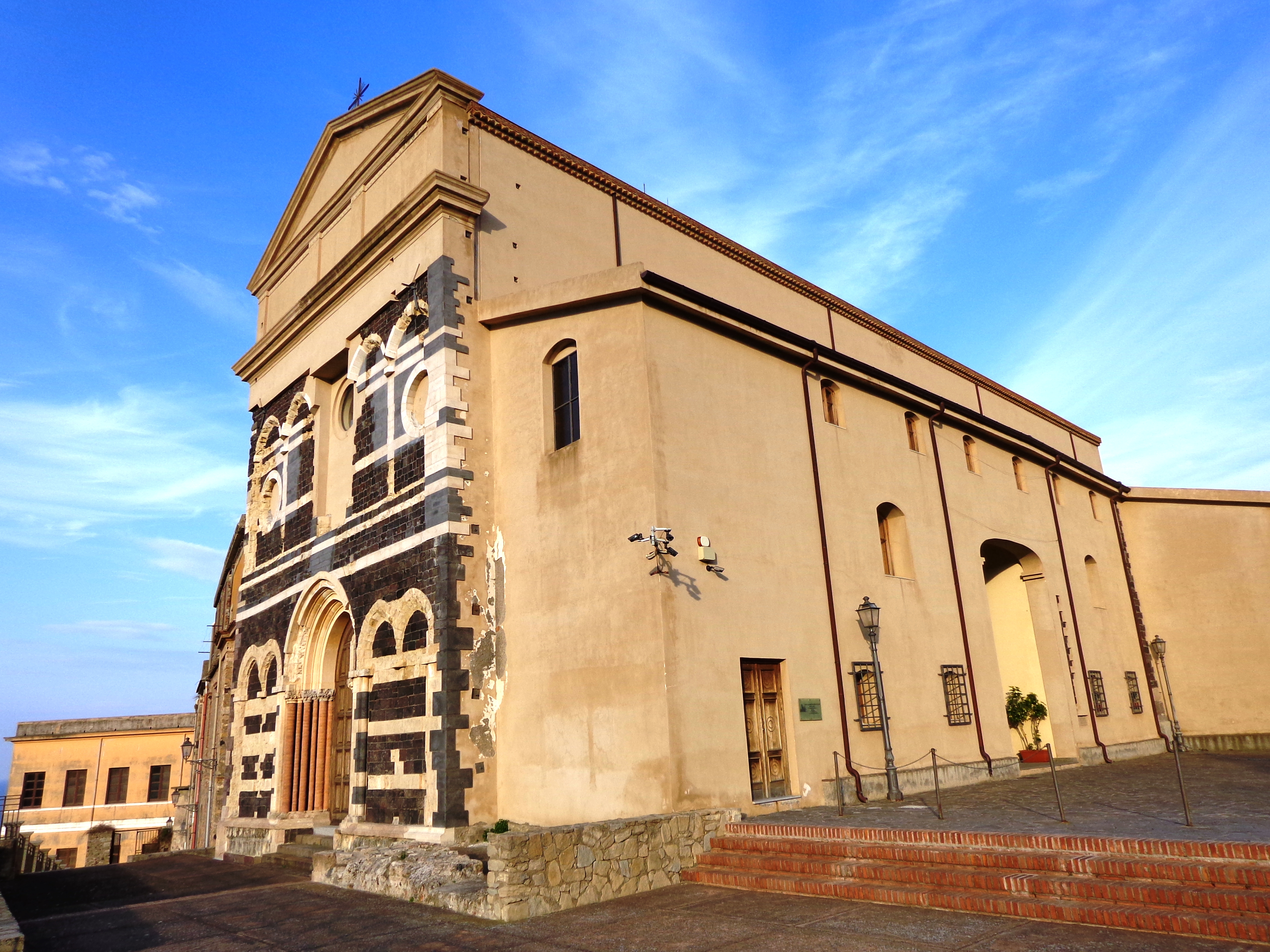 Cattedrale Patti 04